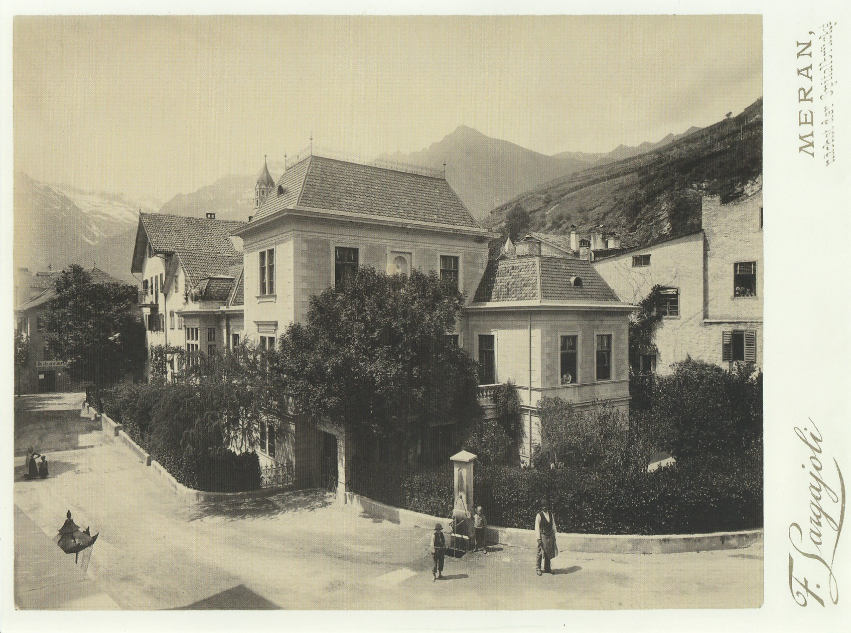 Villa Rathgeb in Meran